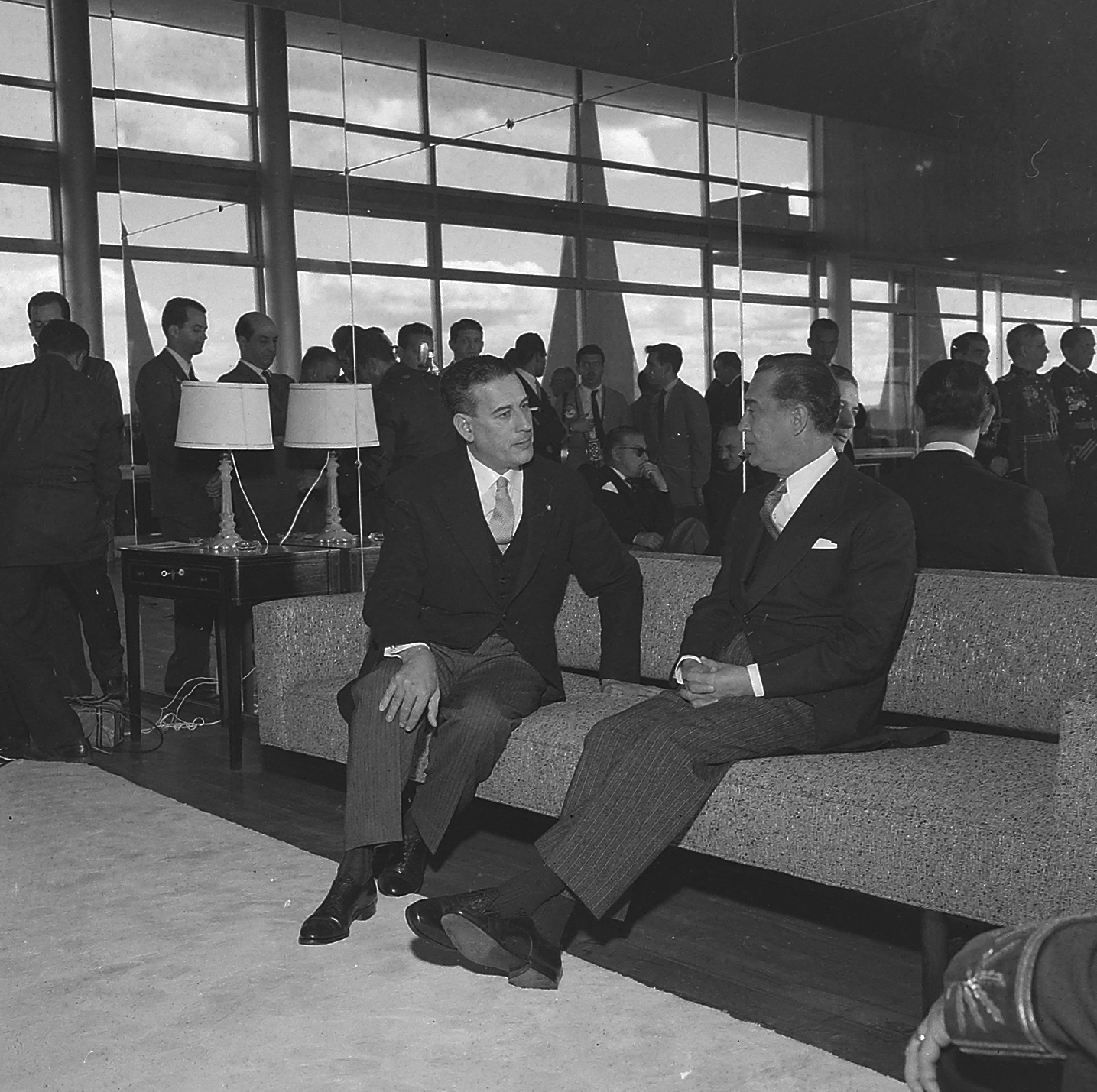 Imagem do Fundo Agência Nacional, do Arquivo Nacional